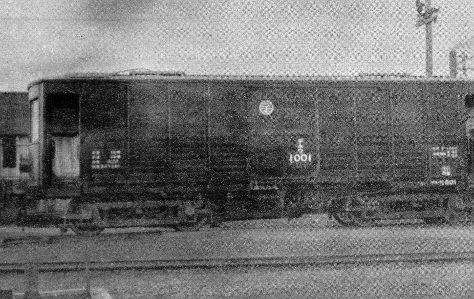 尾西鉄道デホワ1000形